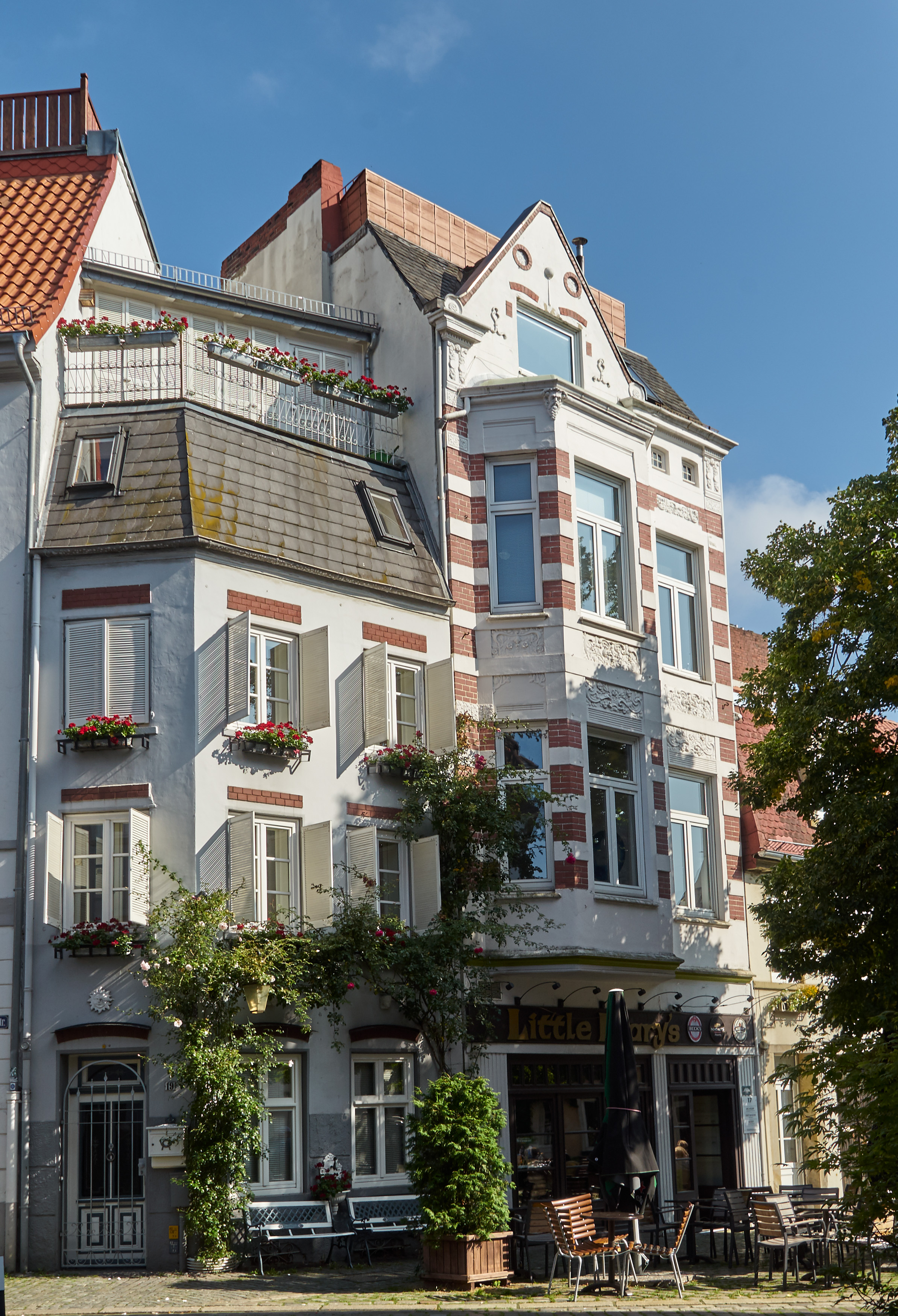 Wohnhaus in Bremen, Stavendamm 17 (18)Das abgebildete Objekt ist ein geschütztes Kulturdenkmal in der Freien Hansestadt Bremen, mit der Nr. 1485 beim Landesamt für Denkmalpflege registriert.